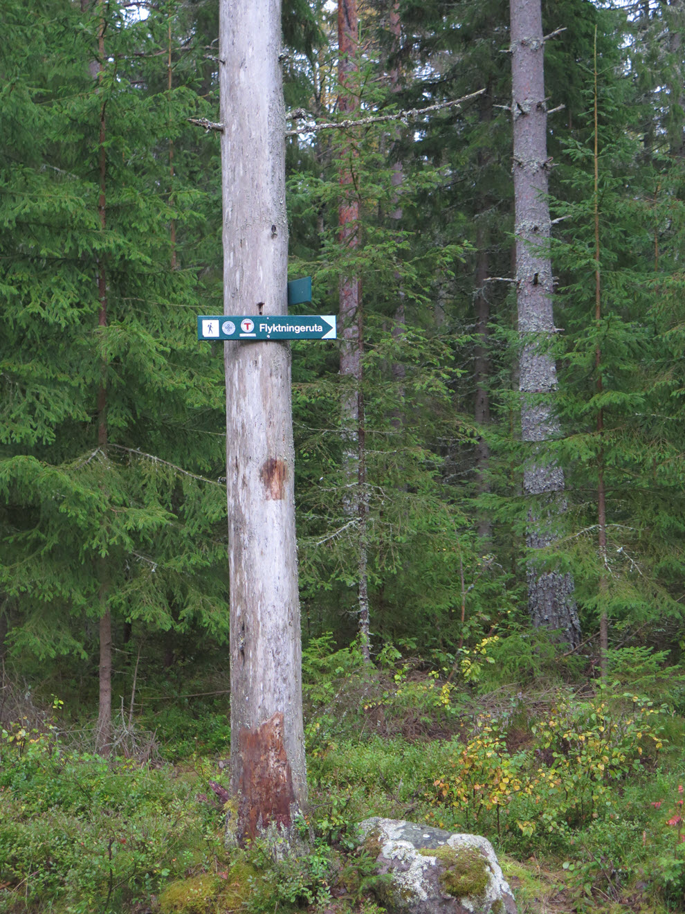 Flyktnigneruta er skiltet og merket helt fra Skullerudstua til Grenselosmuseet i Eidskog